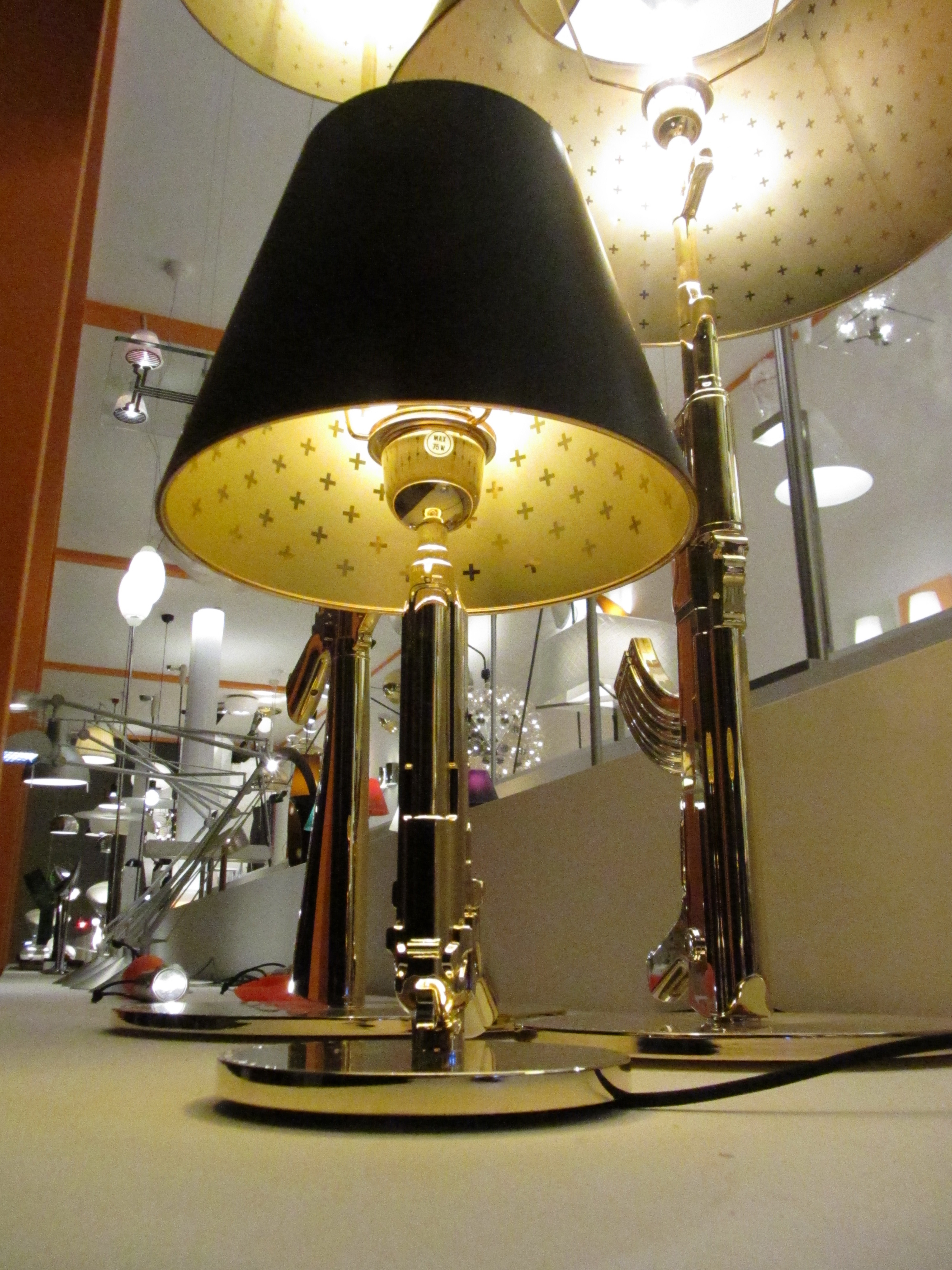 La famiglia di lampade "Gun" durante l'anniversario dei 50 anni dell'azienda tenutosi a Milano durante il fuorisalone 2012 presso il palazzo della permanente